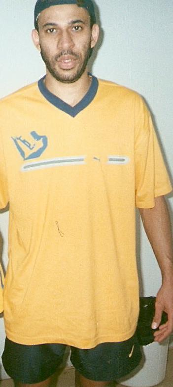 Fuad Anwar Amin